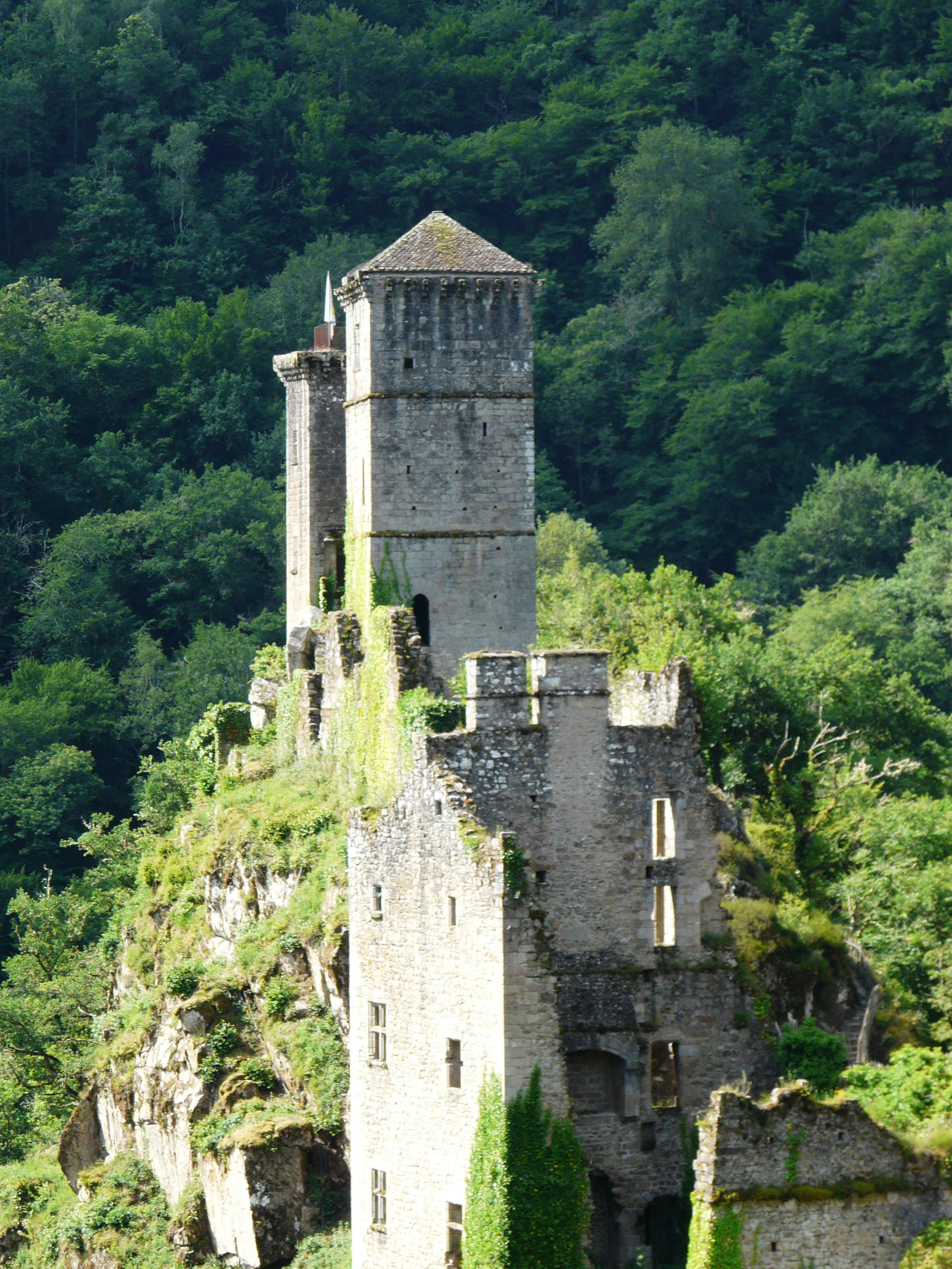 Les tours de Merle, Saint-Geniez-ô-Merle, Corrèze, France.